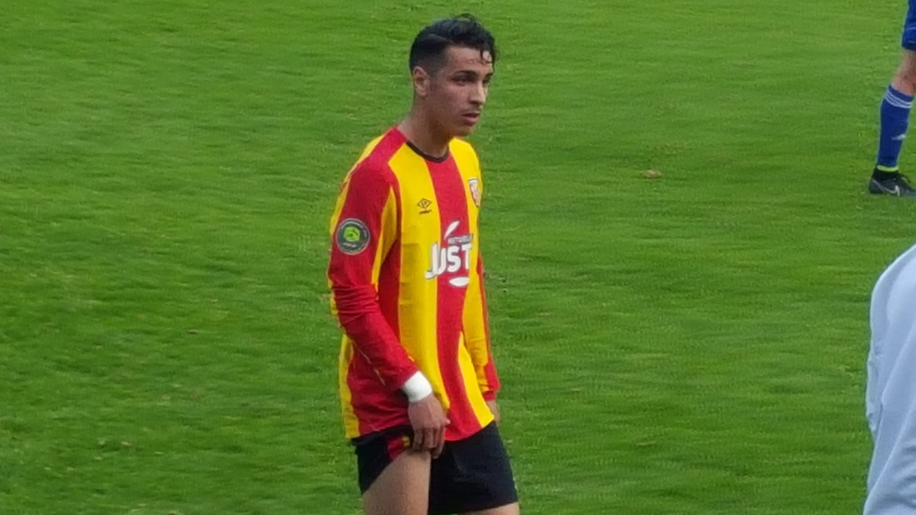 Bilel Aït-Malek lors du match RC Lens B / FCM Aubervilliers, comptant pour la vingt-neuvième journée du Championnat de France de football amateur (CFA), le28 mai 2016, au Stade François Blin d'Avion